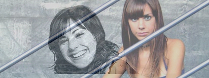 Fotografies de la Bibiana Ballbè.